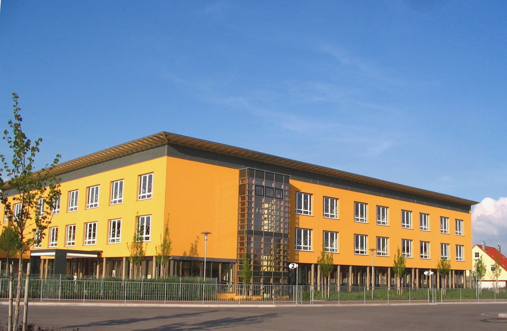 Grund- und Hauptschule in Neustadt an der Donau